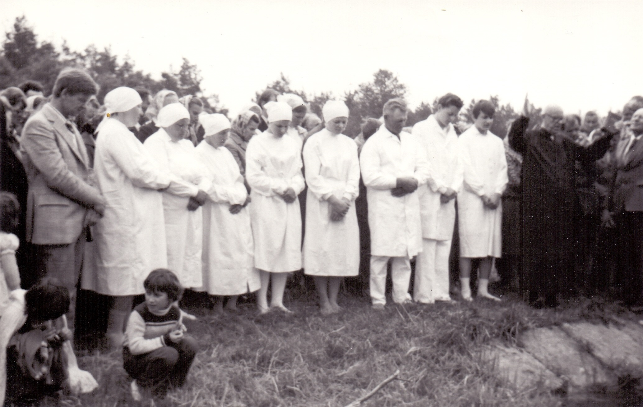 chrzest wodny zboru w Dubiczach Cerkiewnych, nad Orlanką, niedaleko Redut